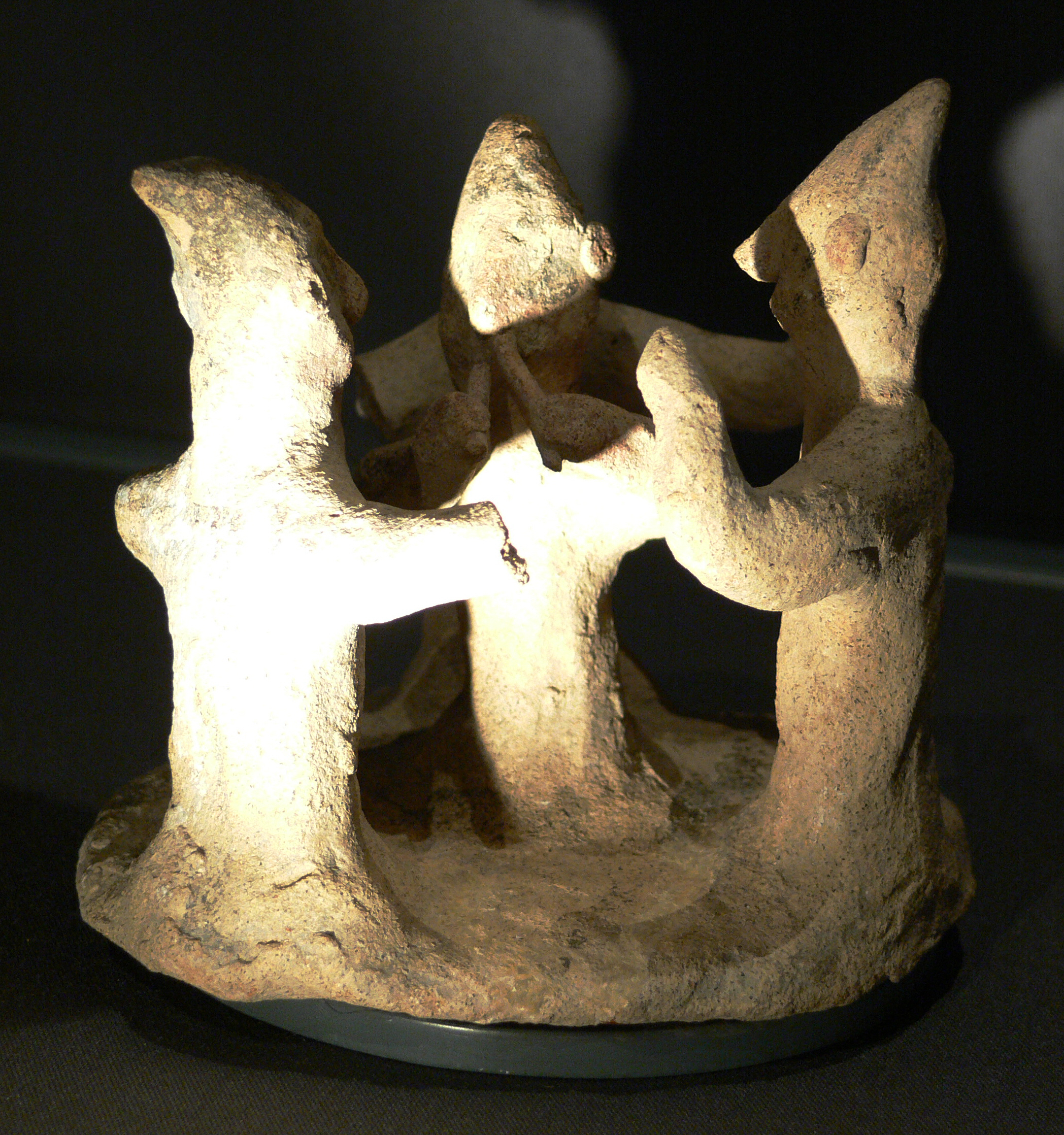 Wien, Kunsthistorisches Museum, Antikensammlung, Reigentanz, Terrakotta, Eisenzeit, zyprisch-archaisch I, 750–600 c. Chr., Inv. Nr. V 1172